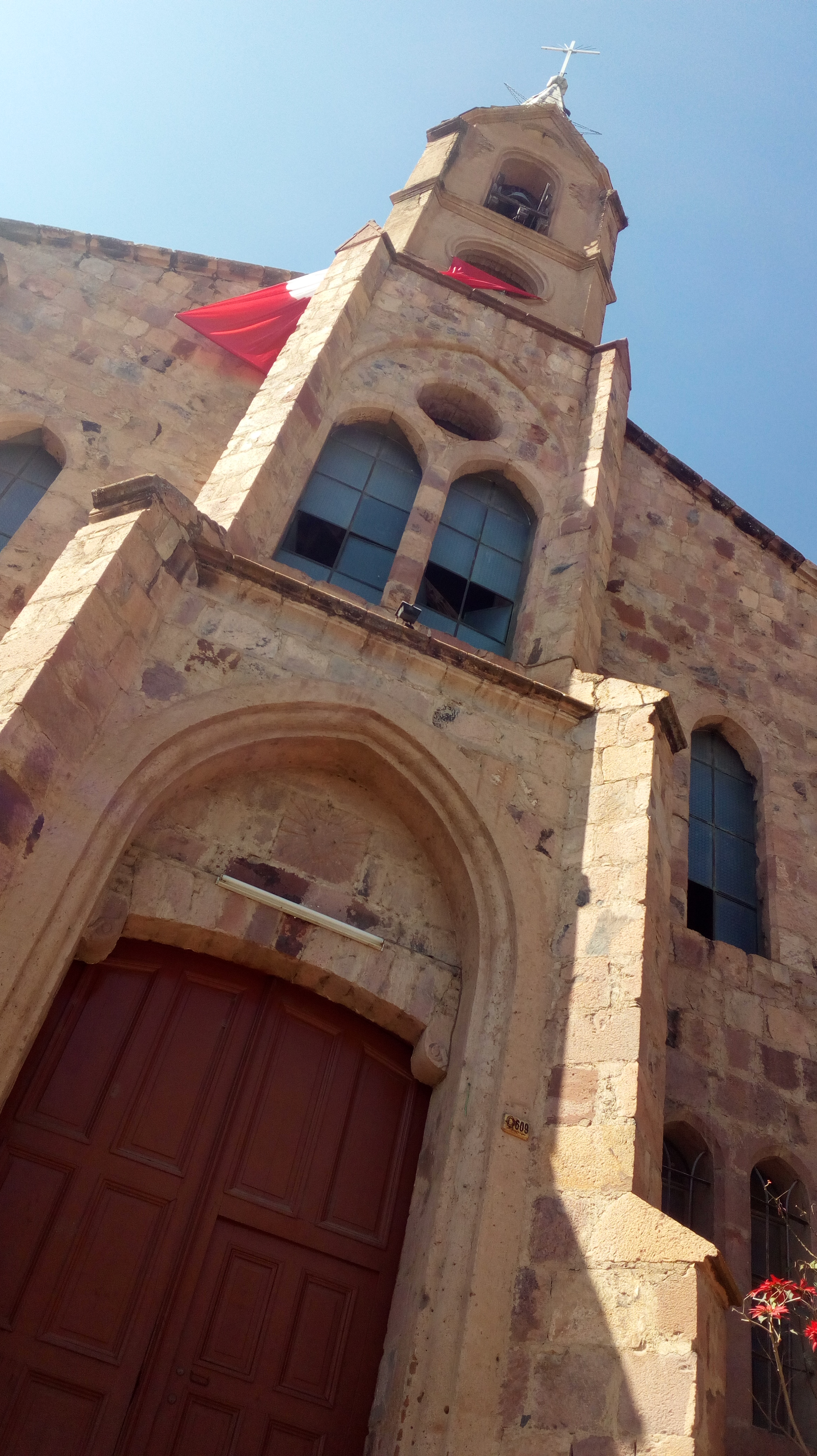 Convento del Sagrado Corazón, Huanta